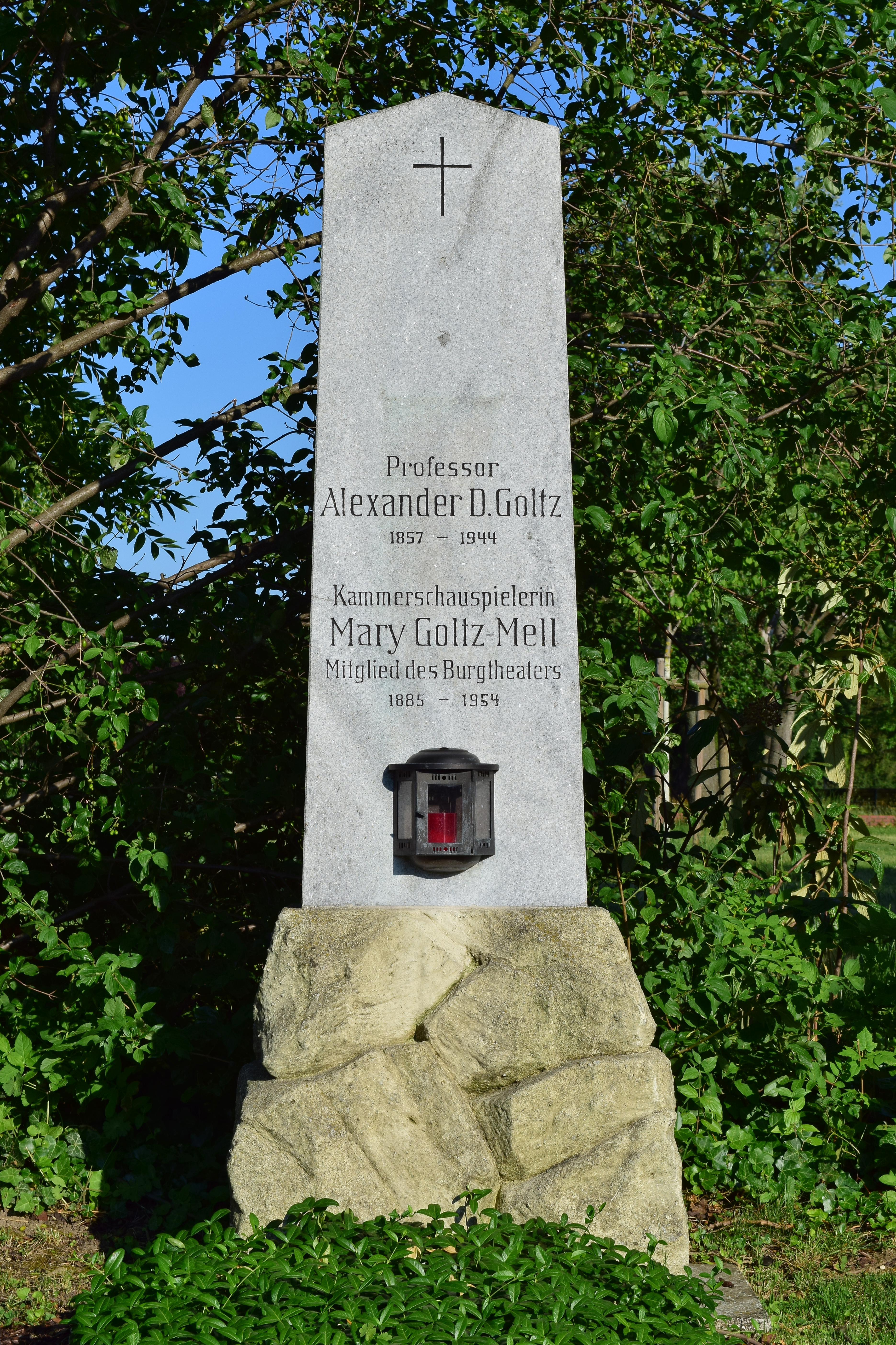 Ehrenhalber gewidmetes Grab von Alexander Demetrius Goltz auf dem Wiener Zentralfriedhof.